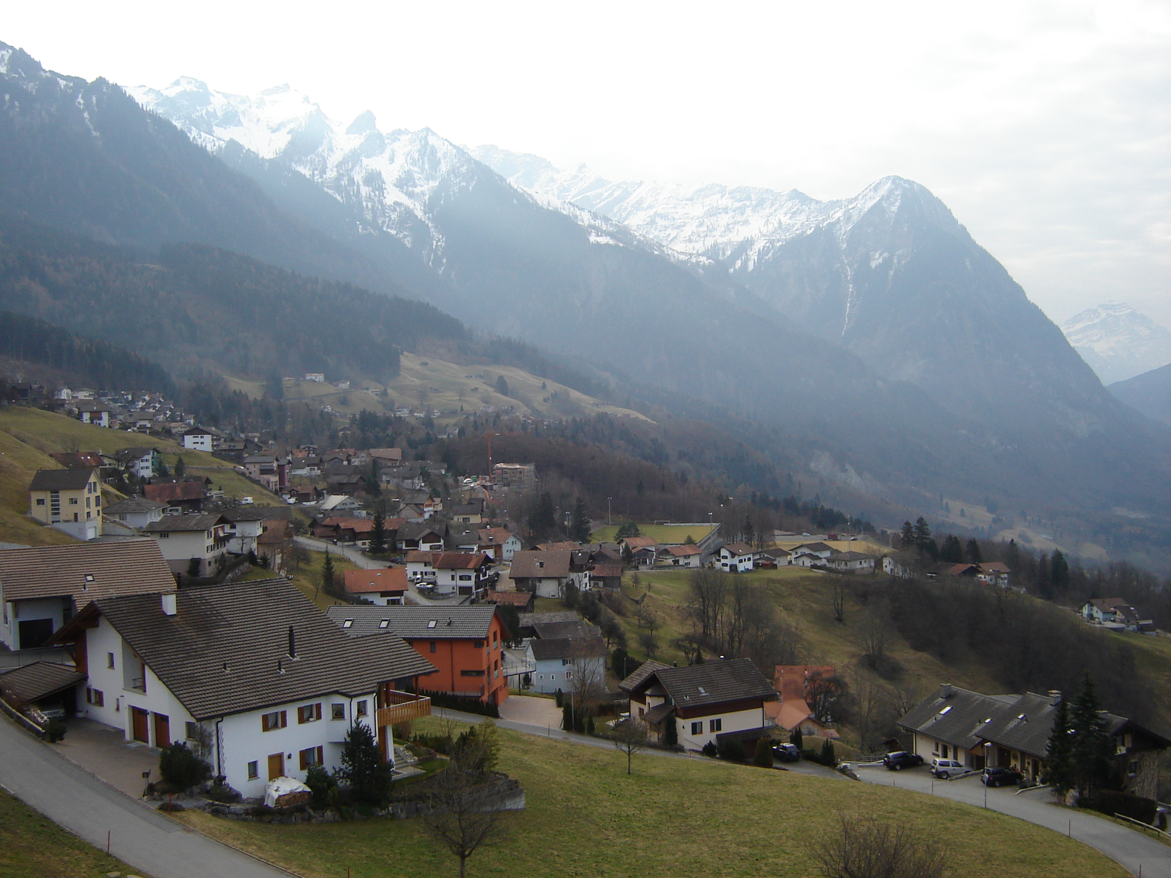 Impressive scenery in Liechtenstein, Europe.